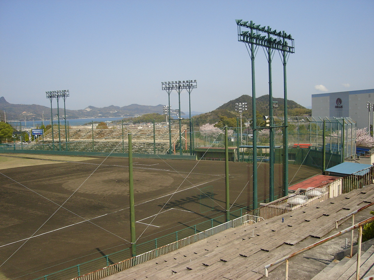 さぬき市志度総合運動公園野球場。 - 日本国香川県さぬき市にある野球場。